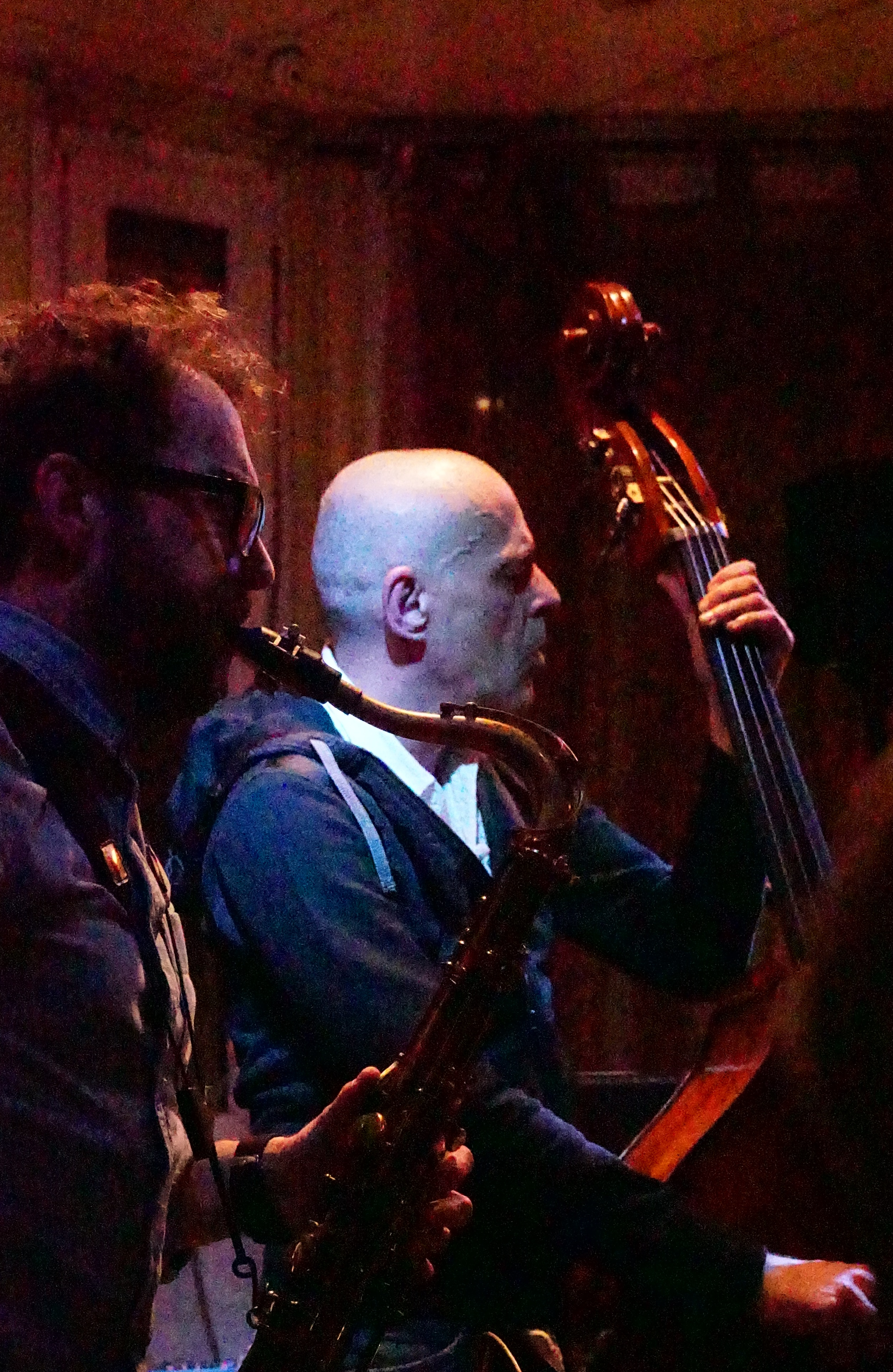 lors de Reis Jazz Festival.